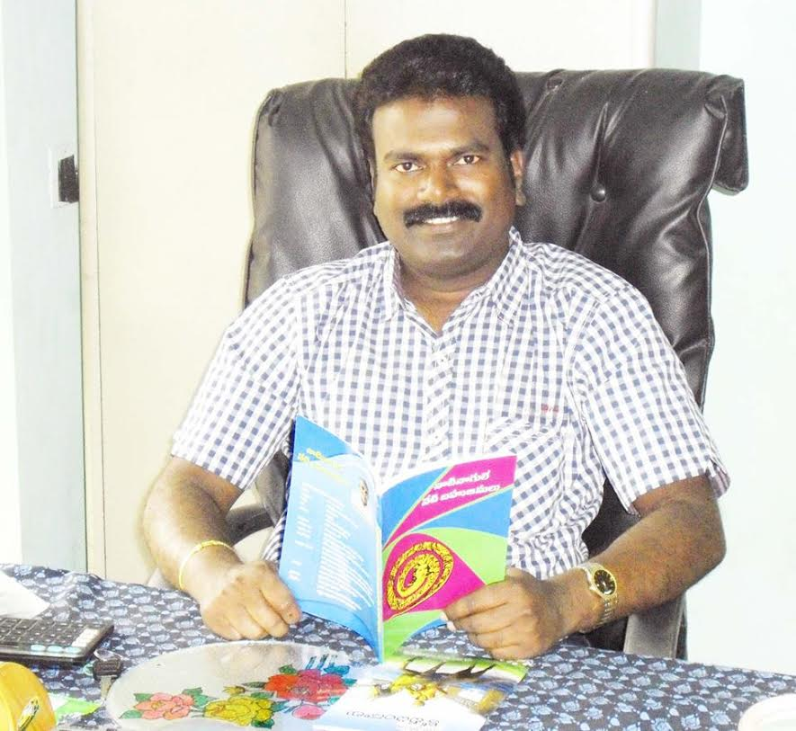 కత్తిమండ ప్రతాప్